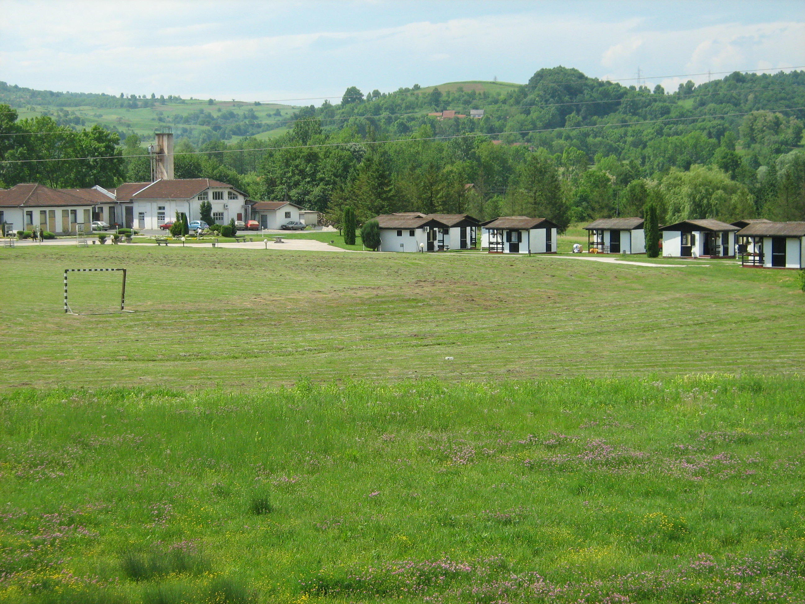 Pogled na banju Mljecanicu